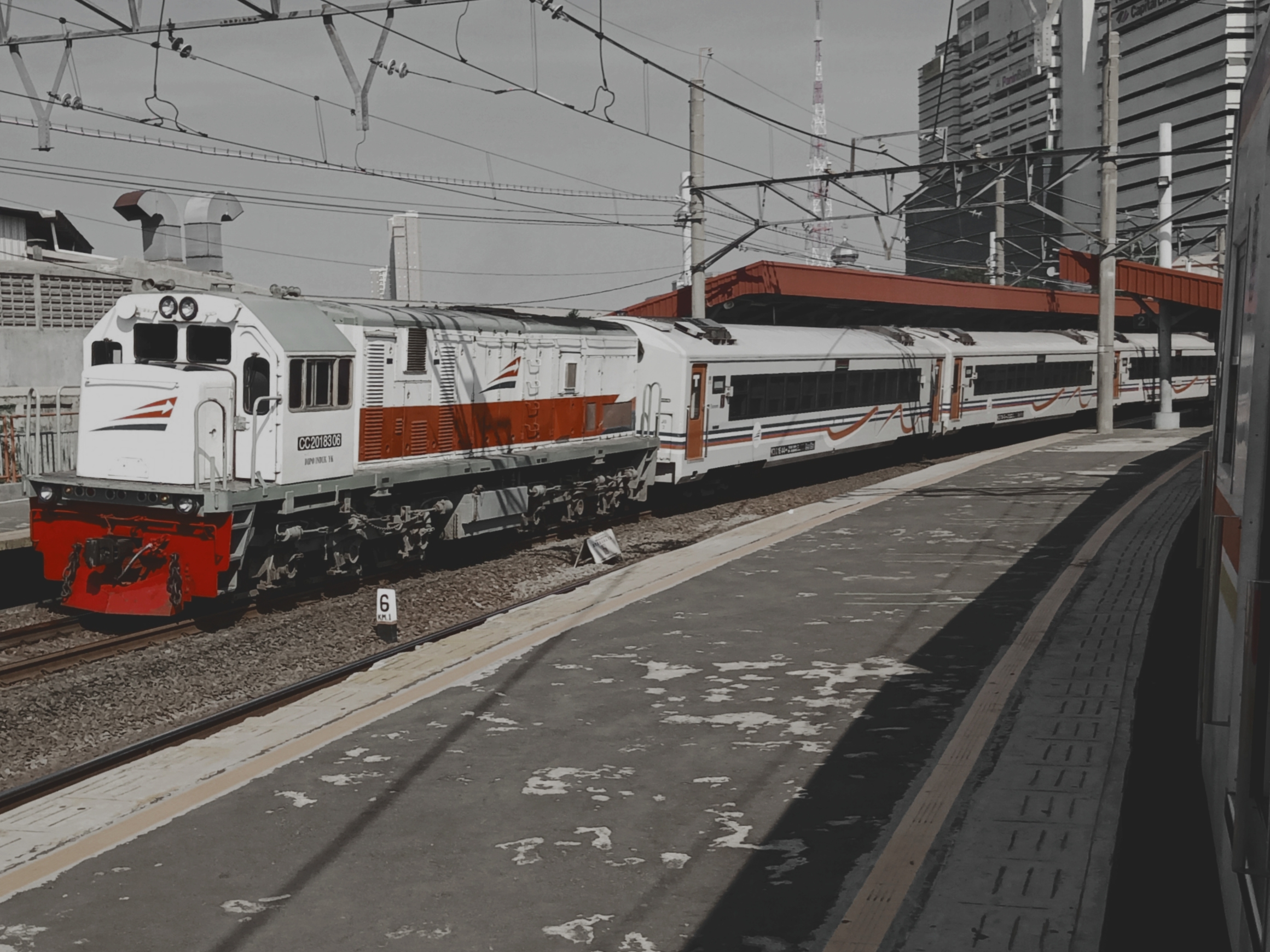 KA 149 Menoreh melintas di Stasiun Kampungbandan